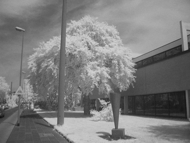 Ein Baum vor dem Lehmbruck Museum in Duisburg. Fotografiert unter Verwendung eines IR Filters